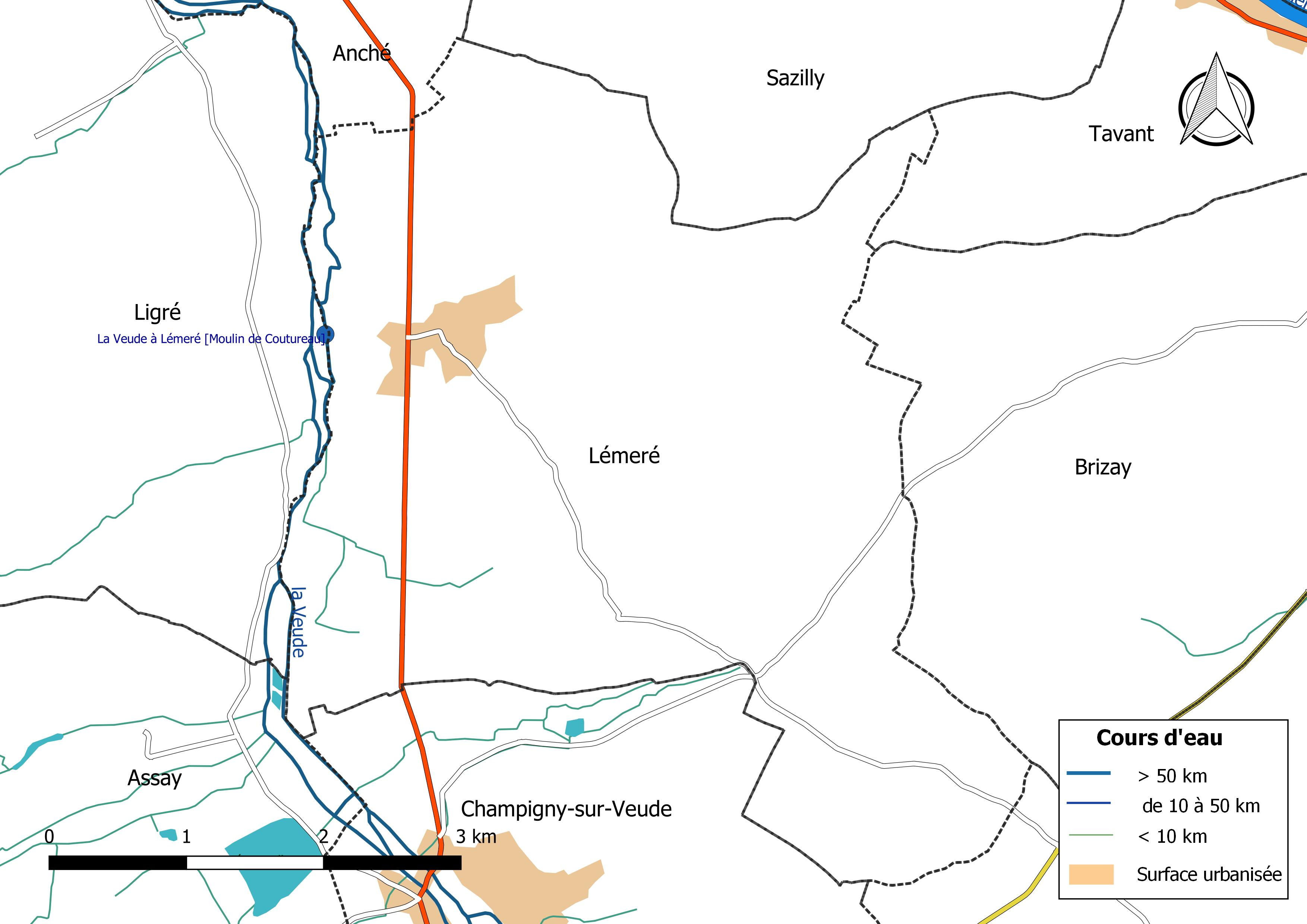 Carte du réseau hydrographique de la commune de Lémeré (France).